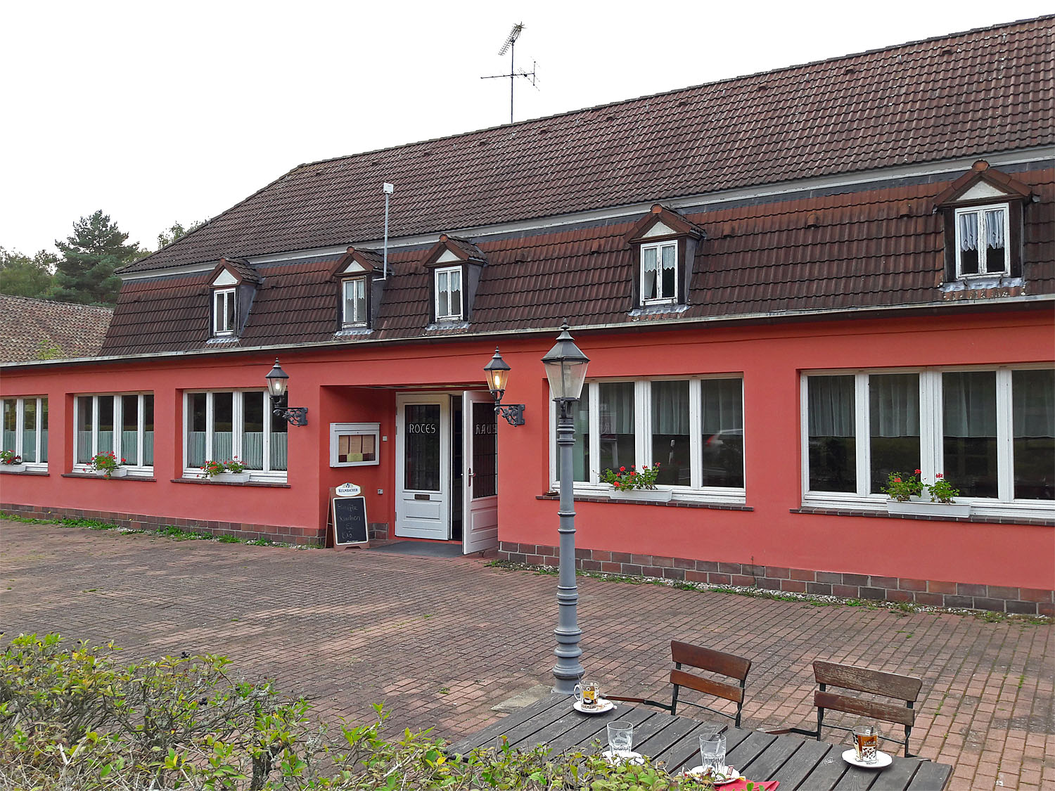 Rotes Haus in Brösen bei Bad Düben